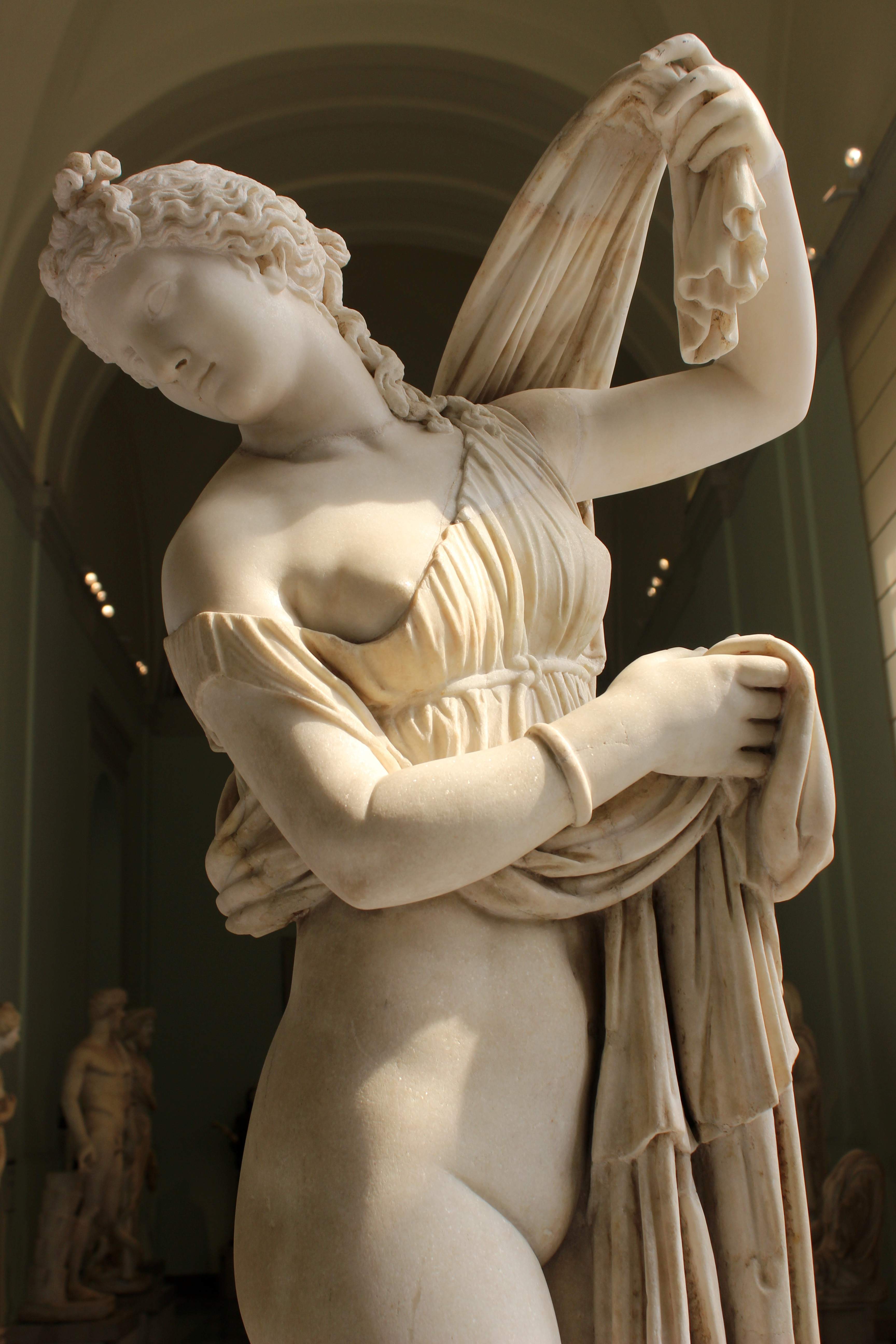 Nápoles, Museo Arqueológico Nacional. Afrodita Kallipyge.